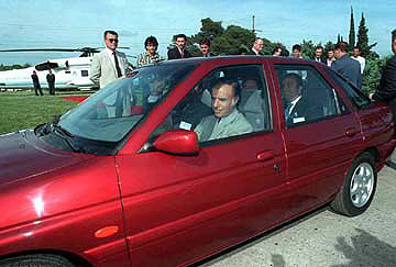 El presidente de la Nación Carlos Saúl Menem asistió al acto de lanzamiento del nuevo modelo Escort que la empresa automotriz Ford Motors Argentina fabricará para el país y el Mercosur.